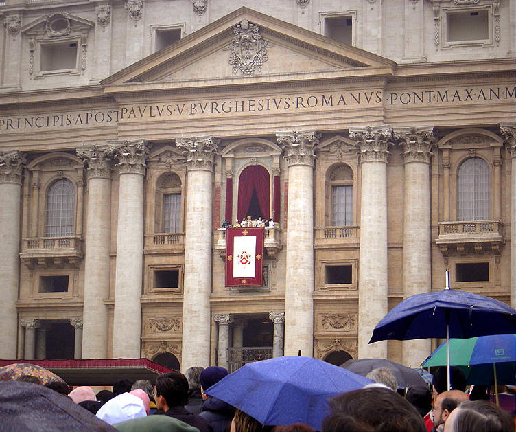 Primeira bênção Urbi et Orbi de Bento XVI, Vaticano, Natal de 2005, meio-dia.